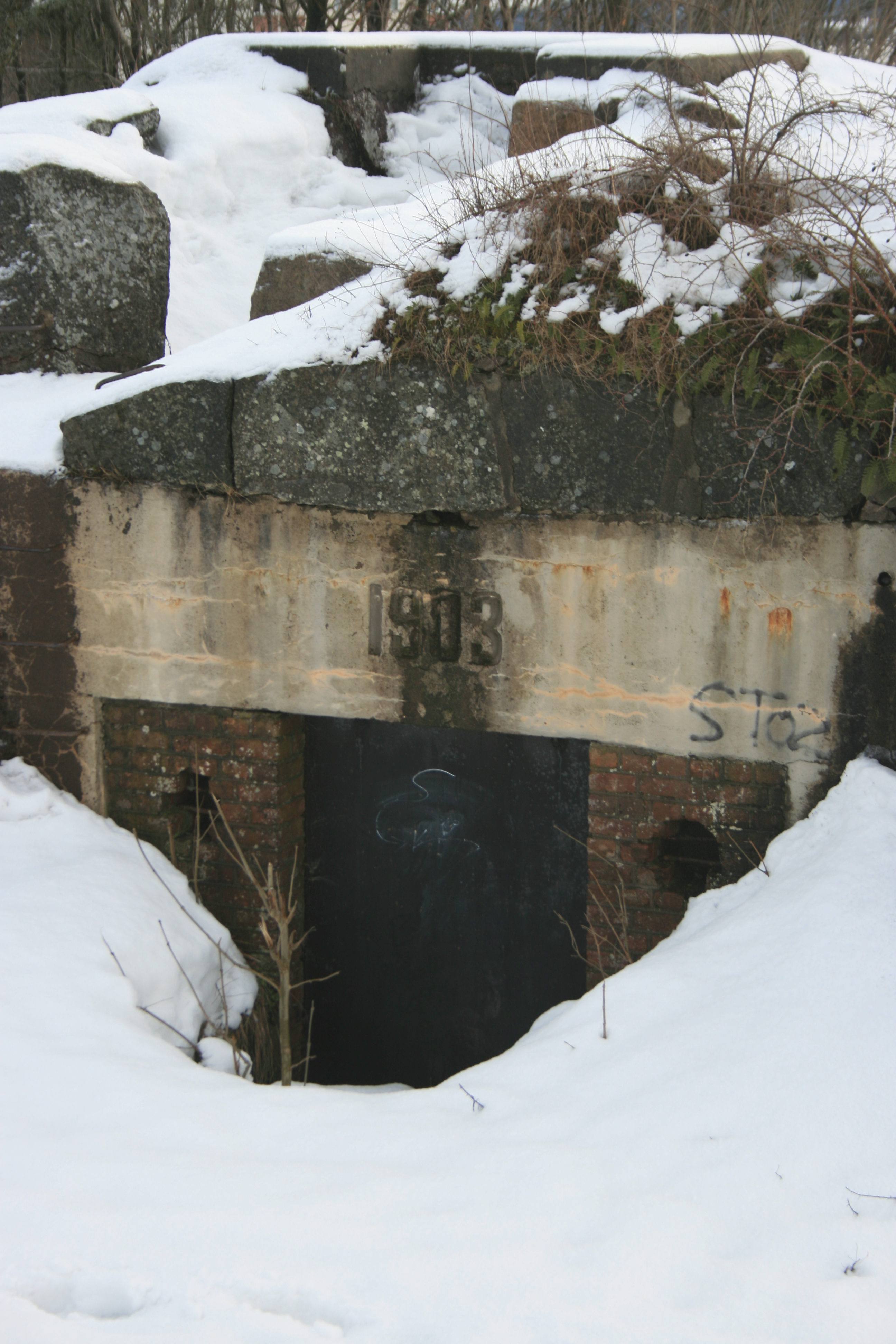 Festningen i Horten.